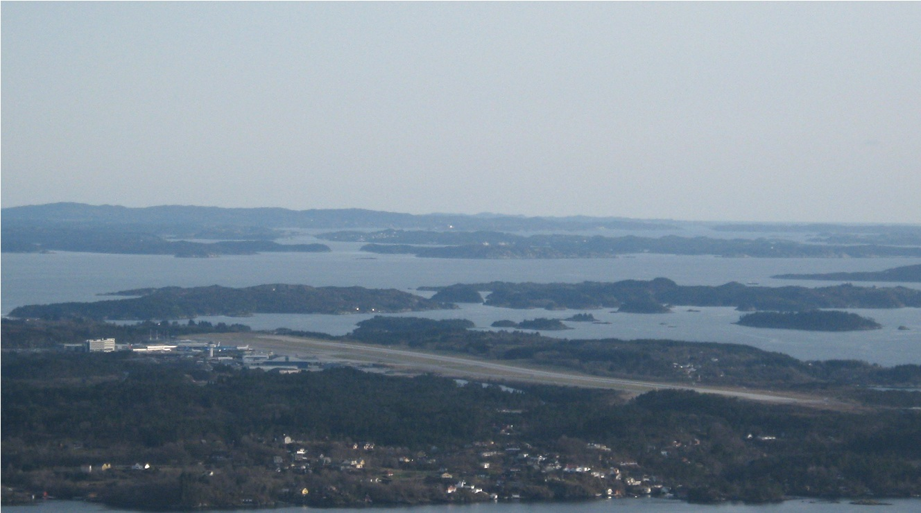 Flesland Flyplass fotografert fra Lyderhorn